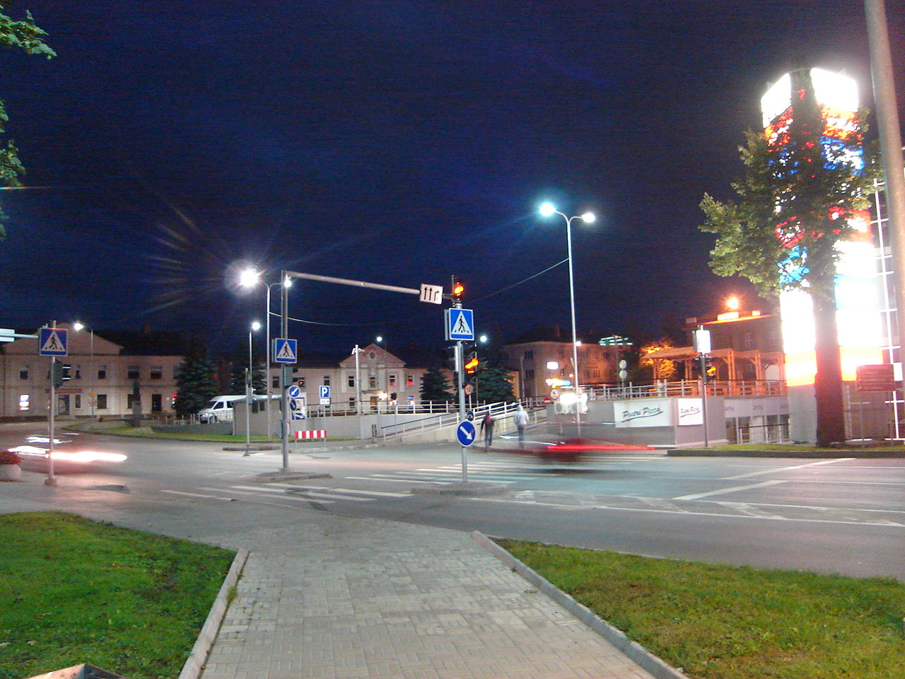 Keskväljak